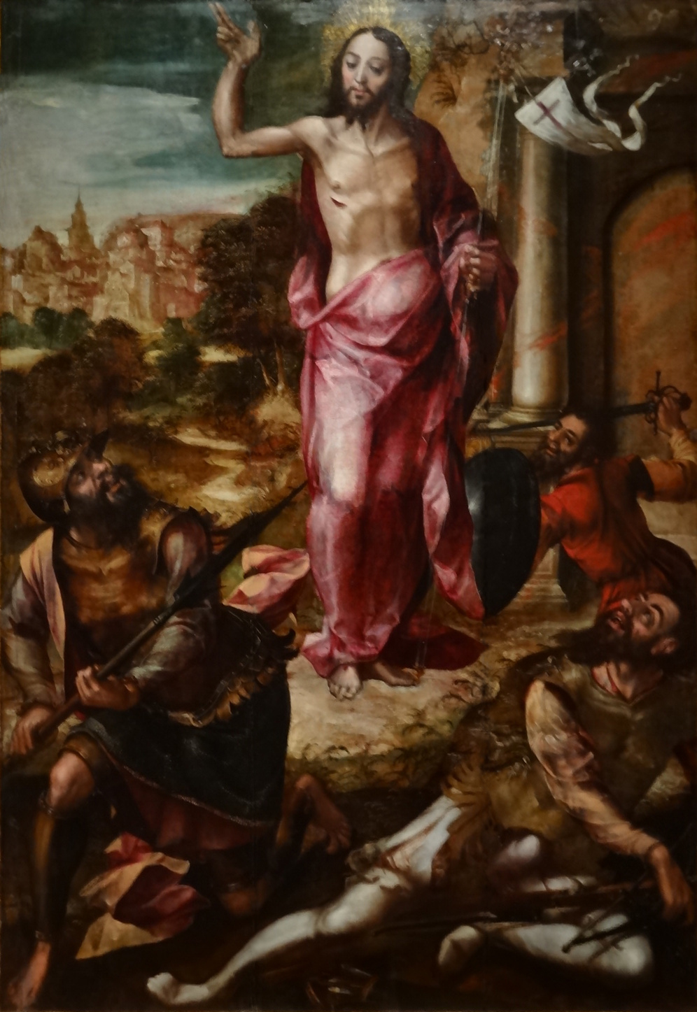 Ressurreição, pintura a óleo sobre madeira de cerca de 1550-60, do chamado Mestre de Abrantes. Faz parte do Políptico da Igreja S. Brás, no Arco da Calheta, Ilha da Madeira.